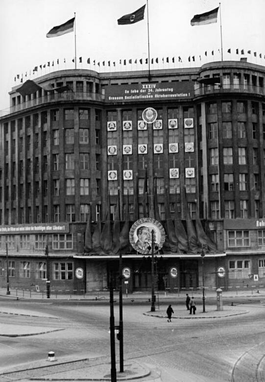 Berlin, "Haus des Zentralkommitees der SED" ADN-ZB Martin 6.11.1951 Berlin: Das festlich geschmückte Zentralhaus der Einheit im Monat der deutsch-sowjetischen Freundschaft vom 7.11.-5.12.1951 Information added by Wikimedia users. banner on top of the buildingdeenXXXIVEs lebe der 34. JahrestagderGrossen Sozialistischen Oktoberrevolution !XXXIVLong live [hooray for] the 34th anniversaryof theGreat Socialist October Revolution !